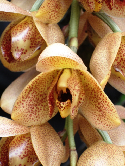 Acineta superba Orquidea cultivada: Club Hato grande (Bogota)